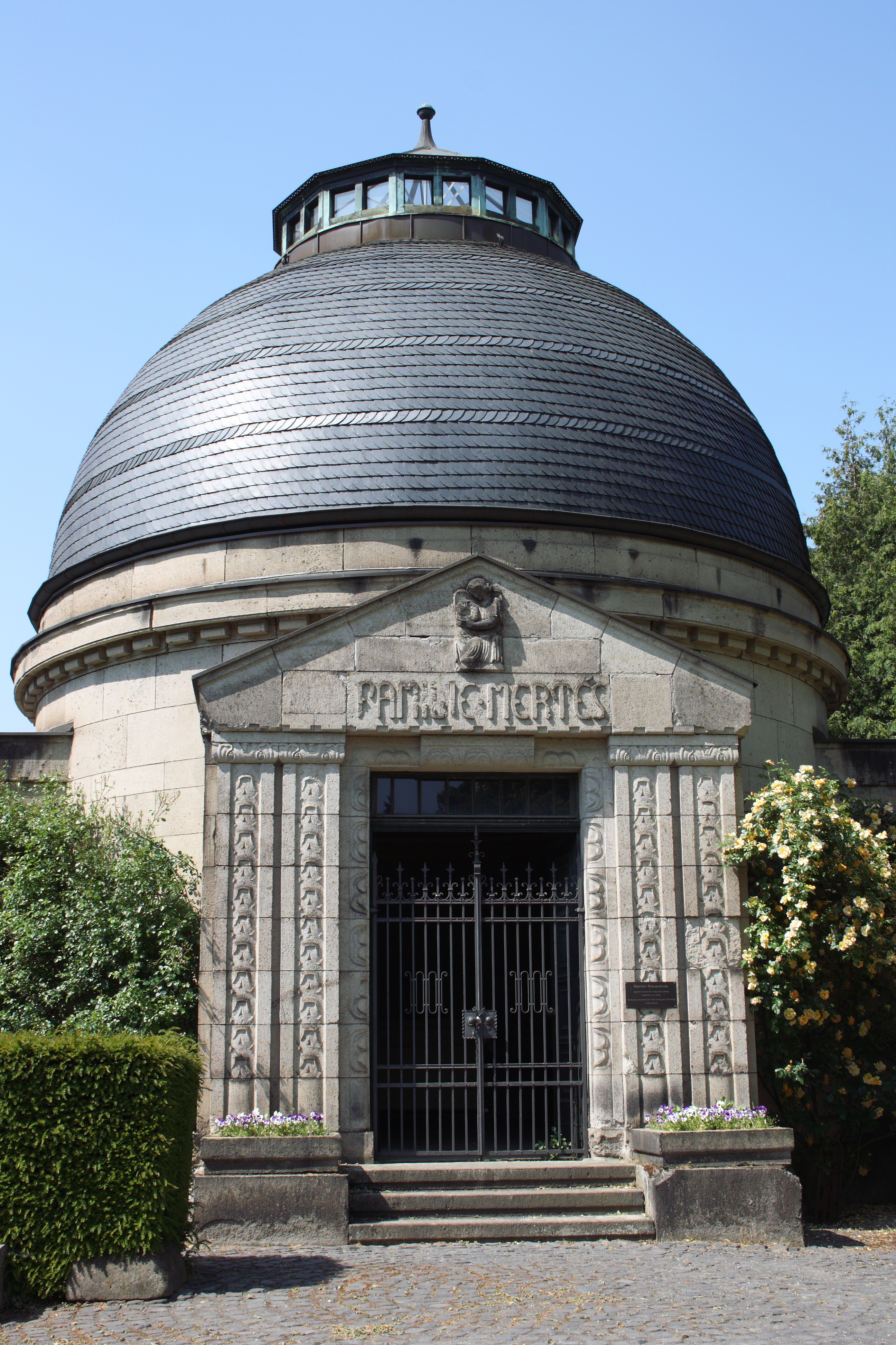 Mausoleum der Familie Mertes in Bad Breisig, Koblenzer Straße, auf dem ehemaligen Friedhof